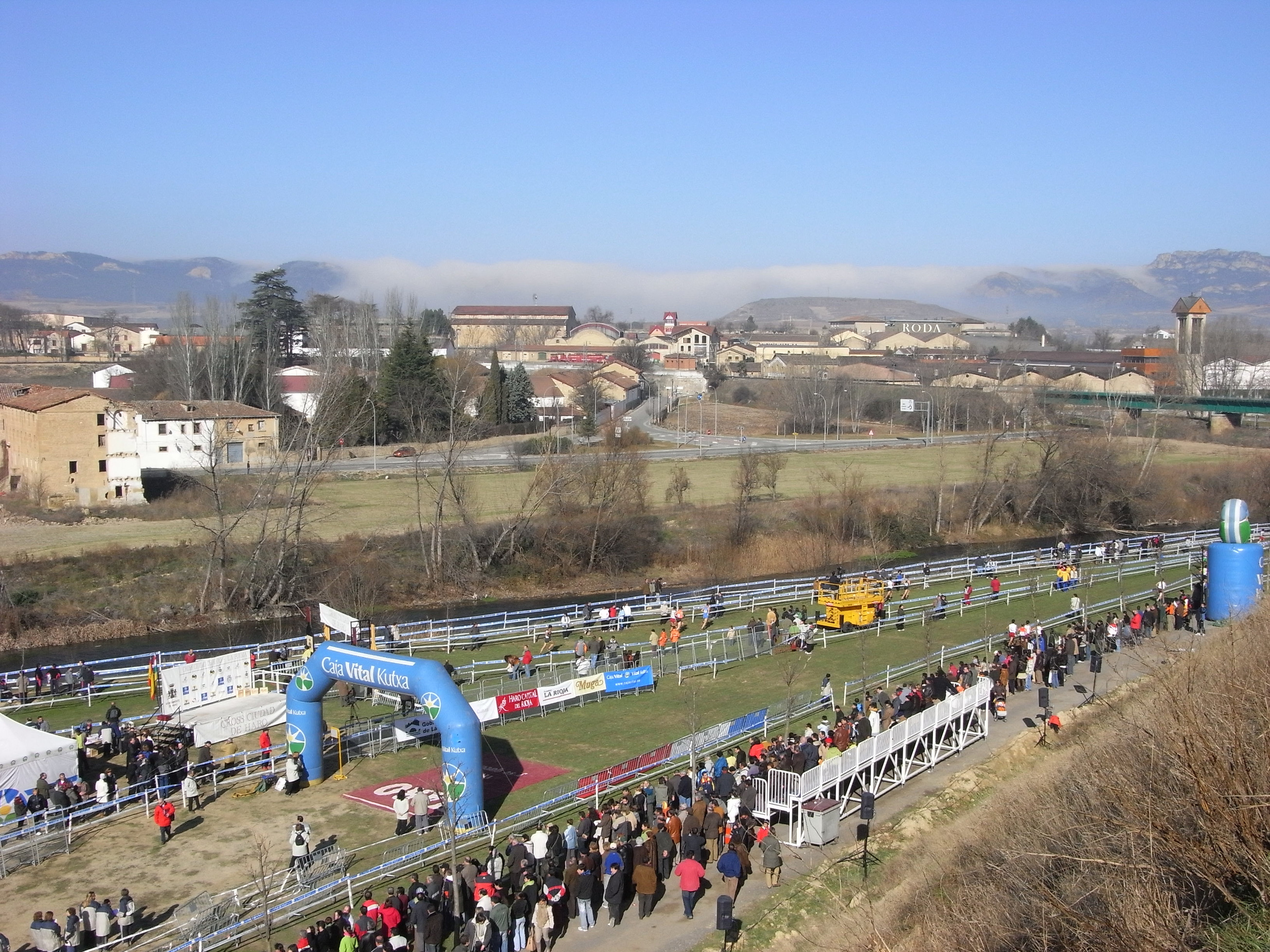 Entorno del cross Ciudad de Haro en La Rioja (España). Al fondo el barrio de las bodegas.